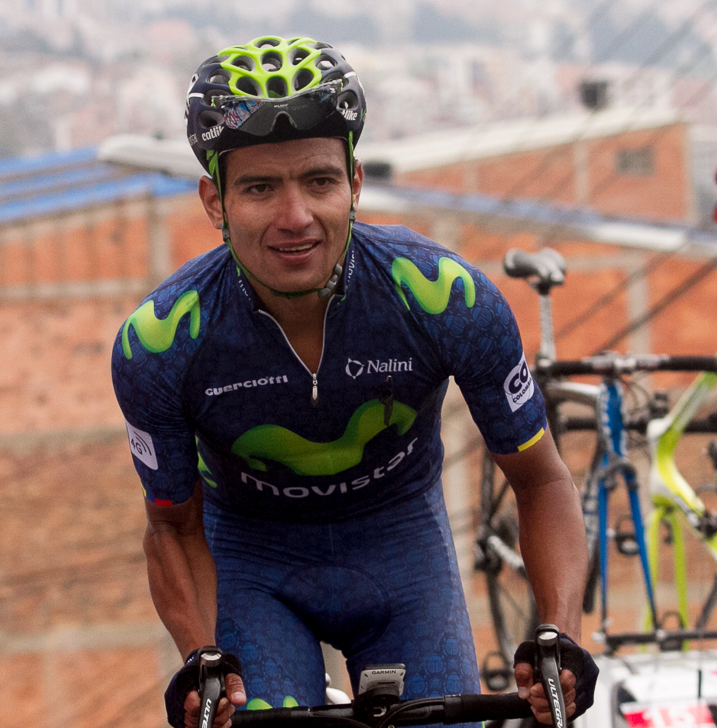 Elites Hombres Campeonatos Nacionales de Ruta Boyará 2016.